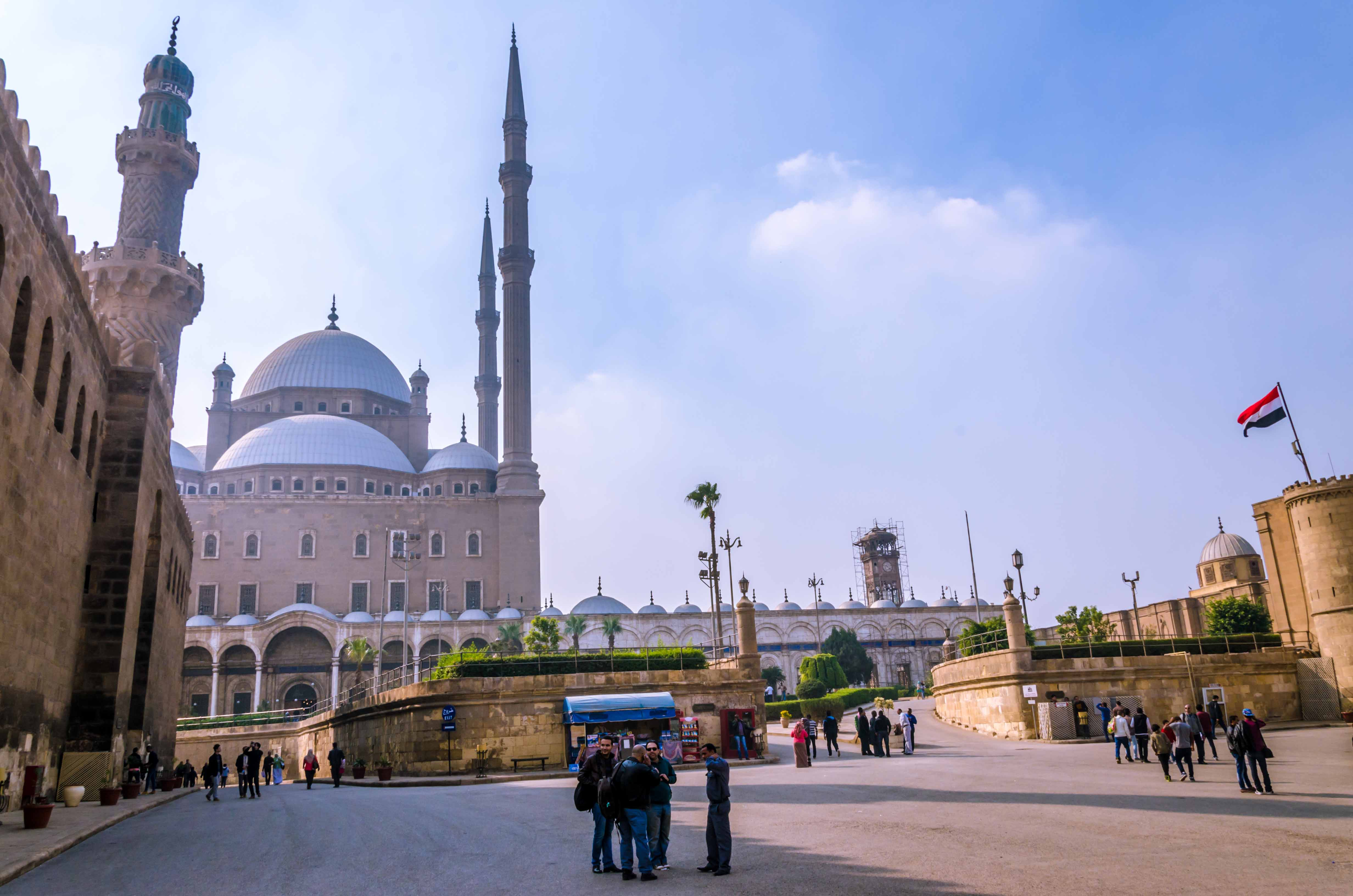 عراقة واصالة قلعة محمد على - مدينة القاهرة